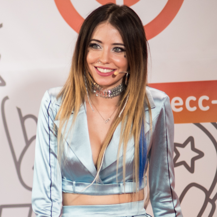 Группа "Время и Стекло" на фестивале «Лайма. Рандеву. Юрмала 2017»